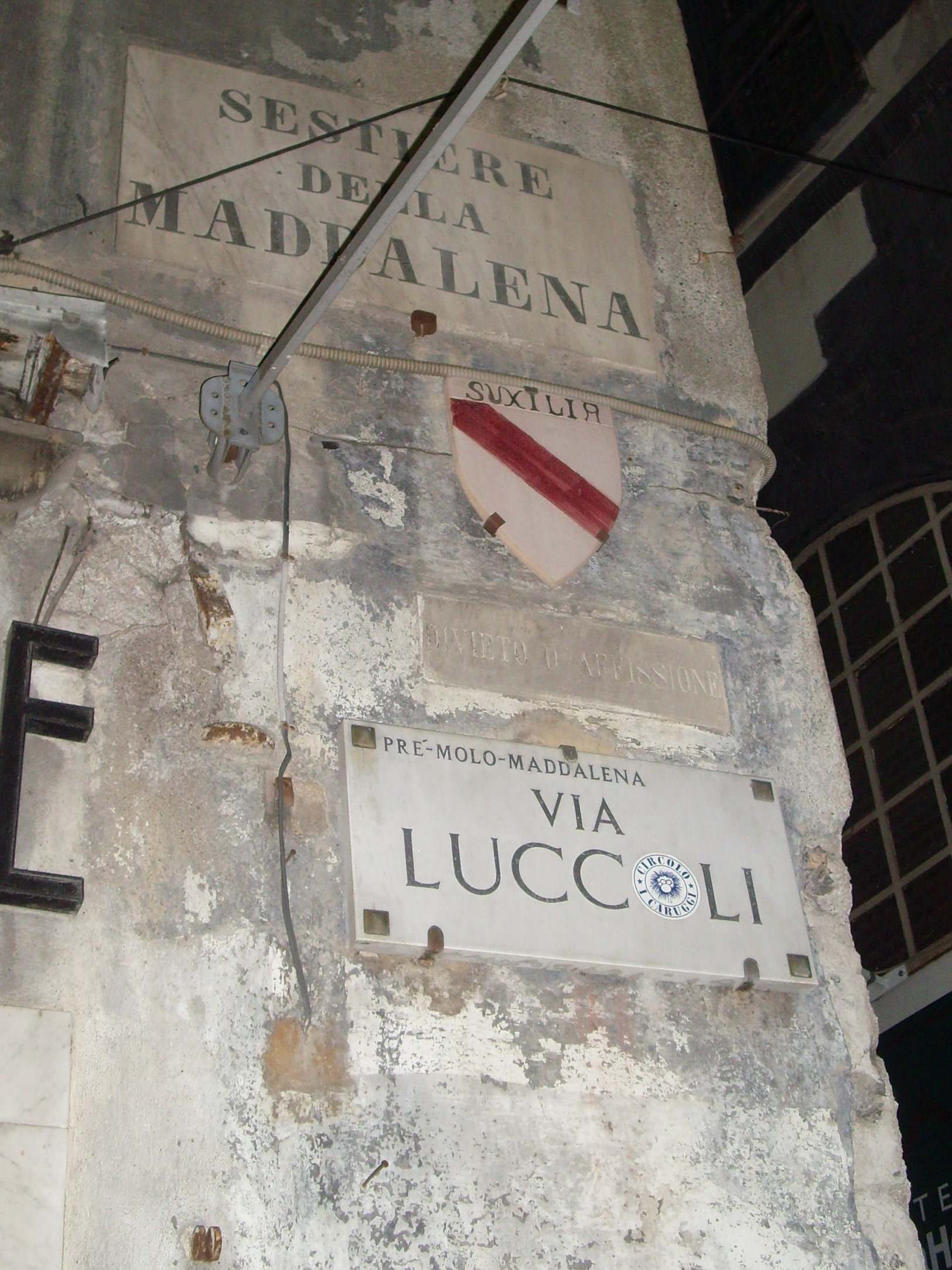 Via Luccoli a Genova, particolare della targa della via, con l'indicazione del sestriere (Maddalena) e della compagnia attiva nel XII secolo (Suxilia, scritta nel tempo anche come Soziglia o Sussilia).